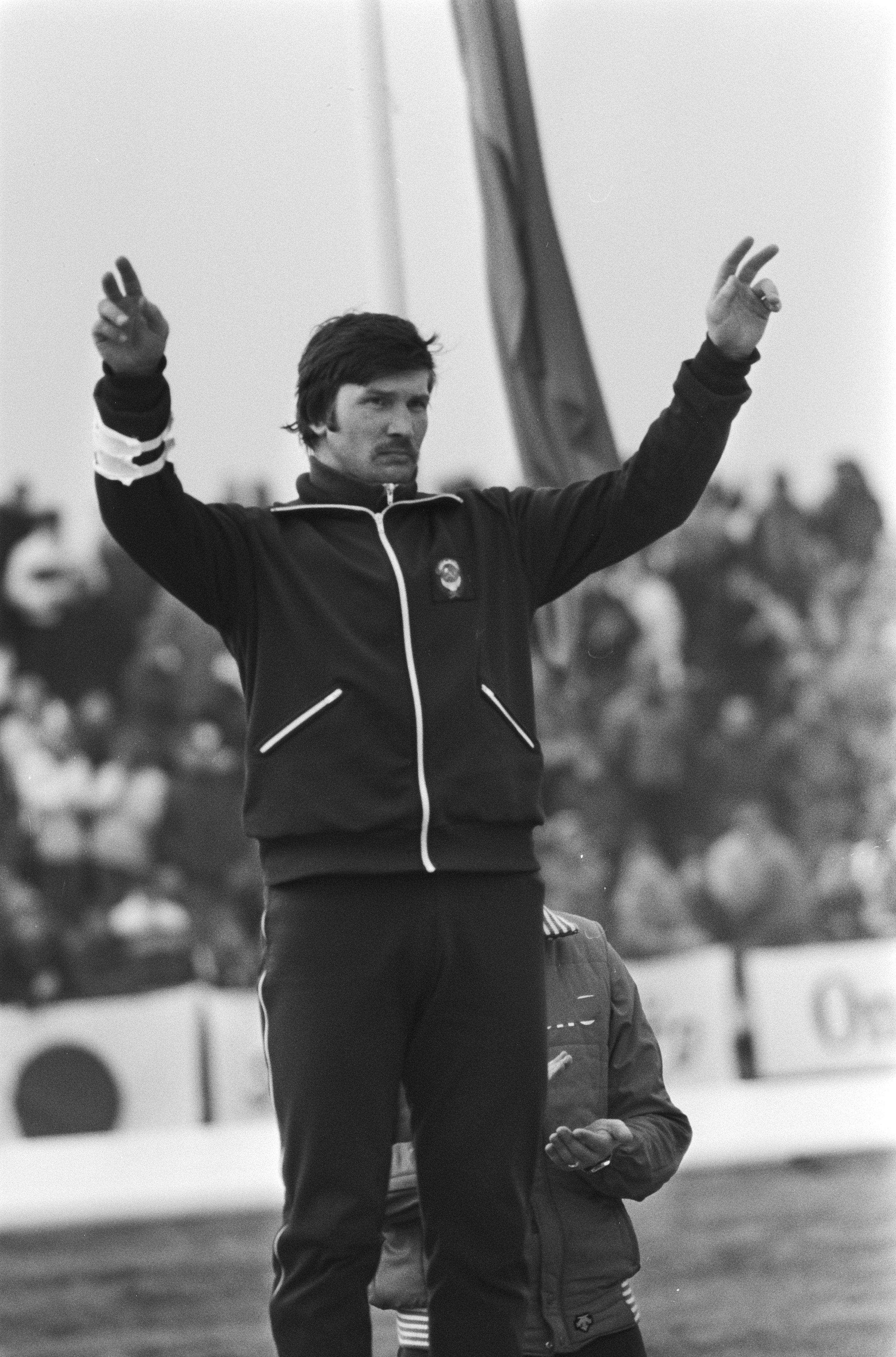 Collectie / Archief : Fotocollectie Anefo Reportage / Serie : [ onbekend ] Beschrijving : WK Sprint schaatsen in Alkmaar. Klebnikov juichend (met bloemen) Datum : 7 februari 1982 Locatie : Alkmaar, Noord-Holland Trefwoorden : SCHAATSEN, sport Fotograaf : Croes, Rob C. / Anefo Auteursrechthebbende : Nationaal Archief Materiaalsoort : Negatief (zwart/wit) Nummer archiefinventaris : bekijk toegang 2.24.01.05 Bestanddeelnummer : 931-9596